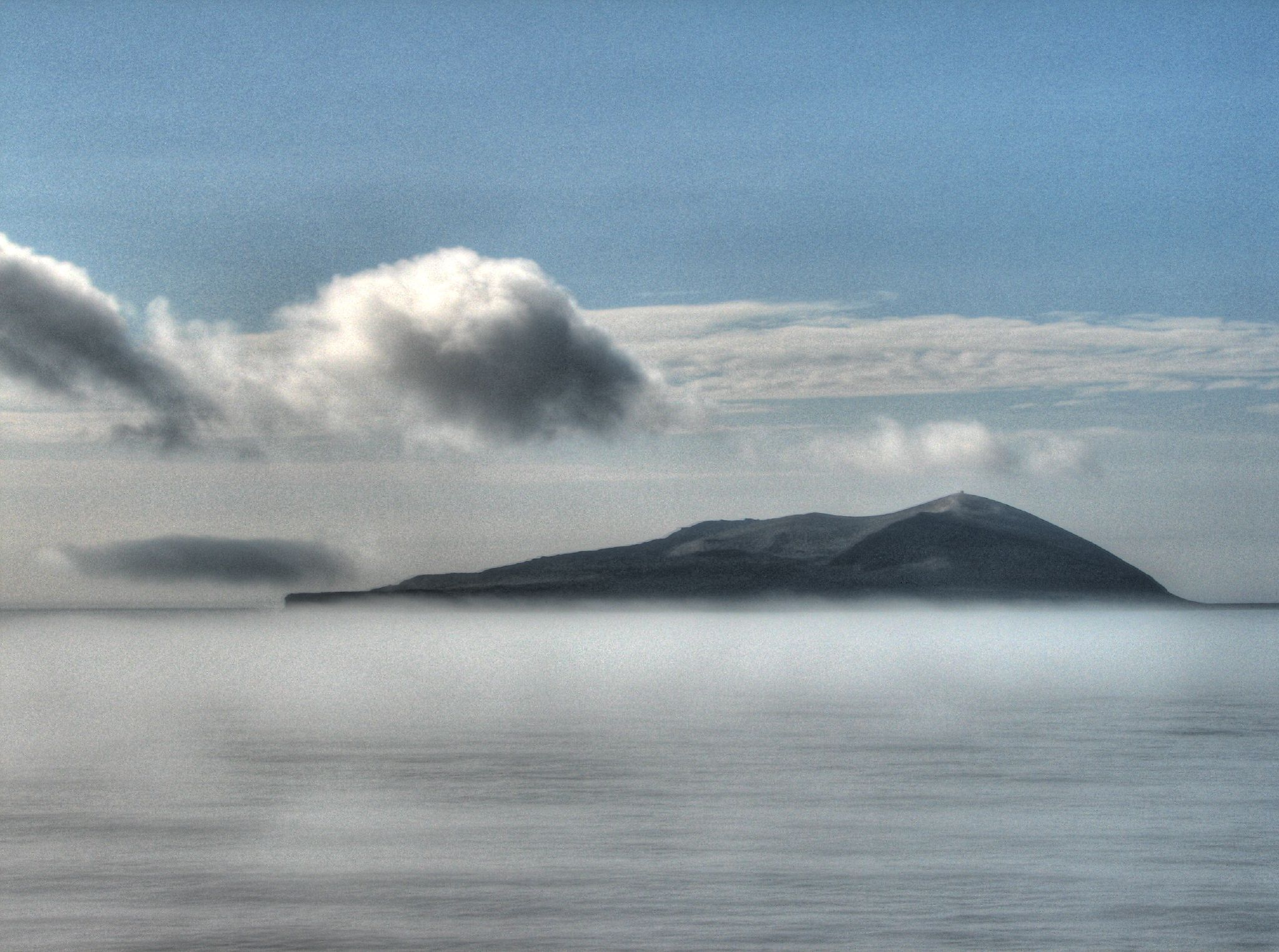 île de Surtsey